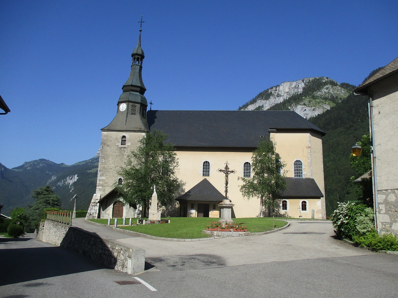 Eglise de Bellevaux